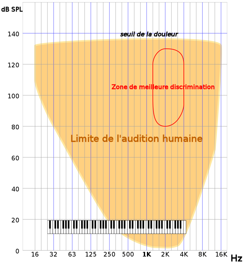 Diagramme du spectre sonore et de l'audition